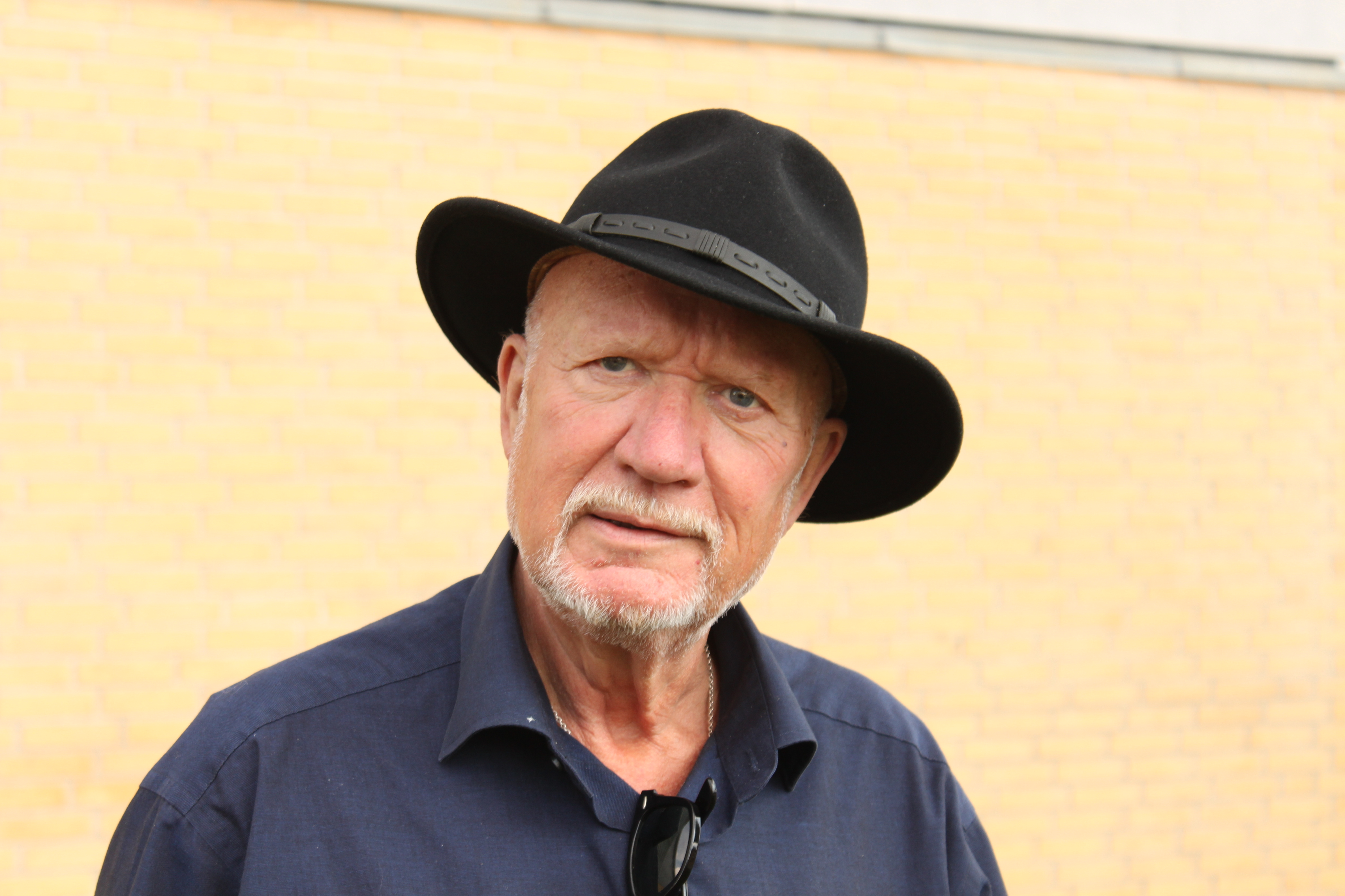 Ingolf Gabold, Juli 2010, taget ved et fordrag på Skolerne i Oure Sport & Performance, til brug for Wikipedia. Gabold er iført en hat af mærket Stetson.